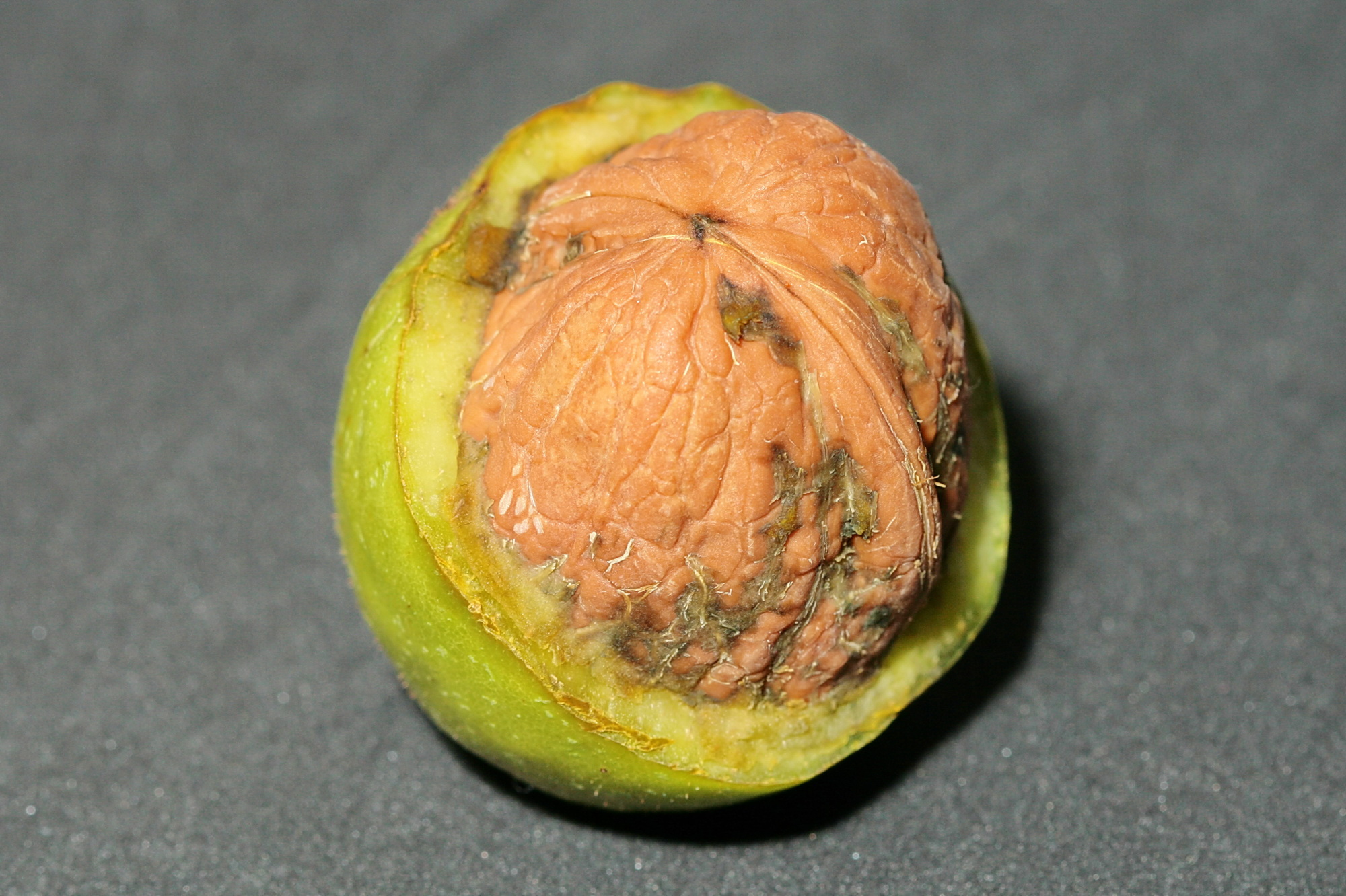 Walnuss in der Fruchtschale, halb geschält, Niedersachsen, Deutschland